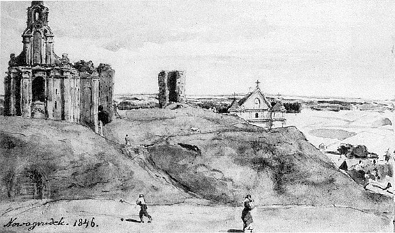 Беларуская (тарашкевіца): Наваградак (Navahradak), вуліца Замкавая (vulica Zamkavaja)